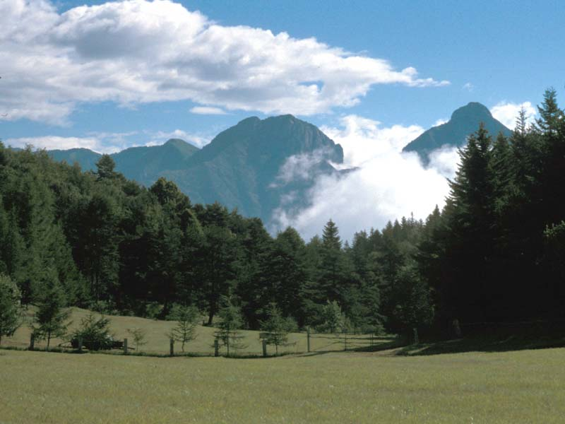 Ligurische Alpen